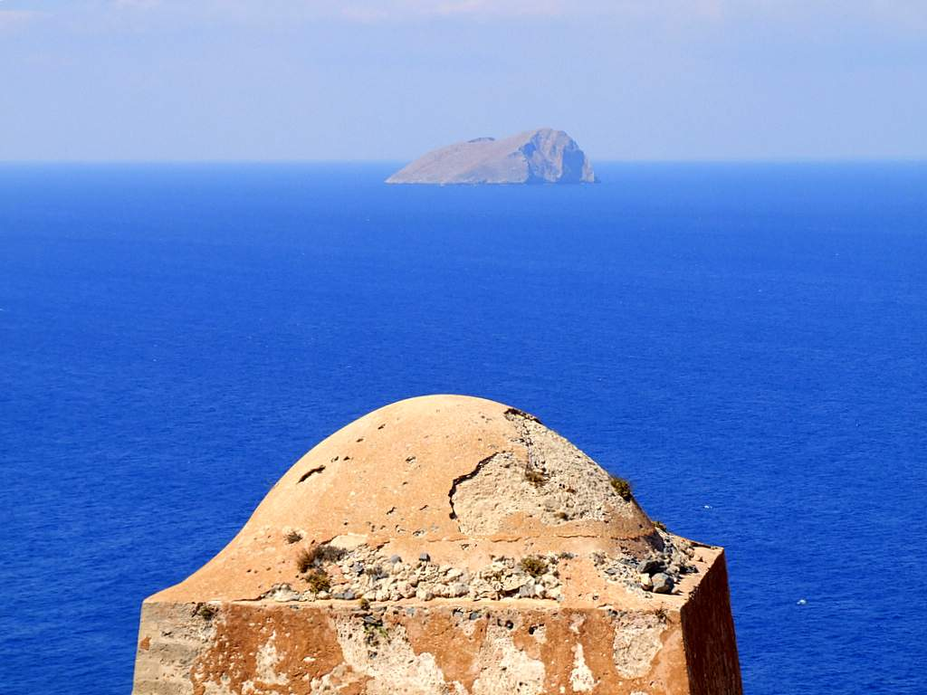 Pondikonisi Island, Kissamos, Crete, Greece